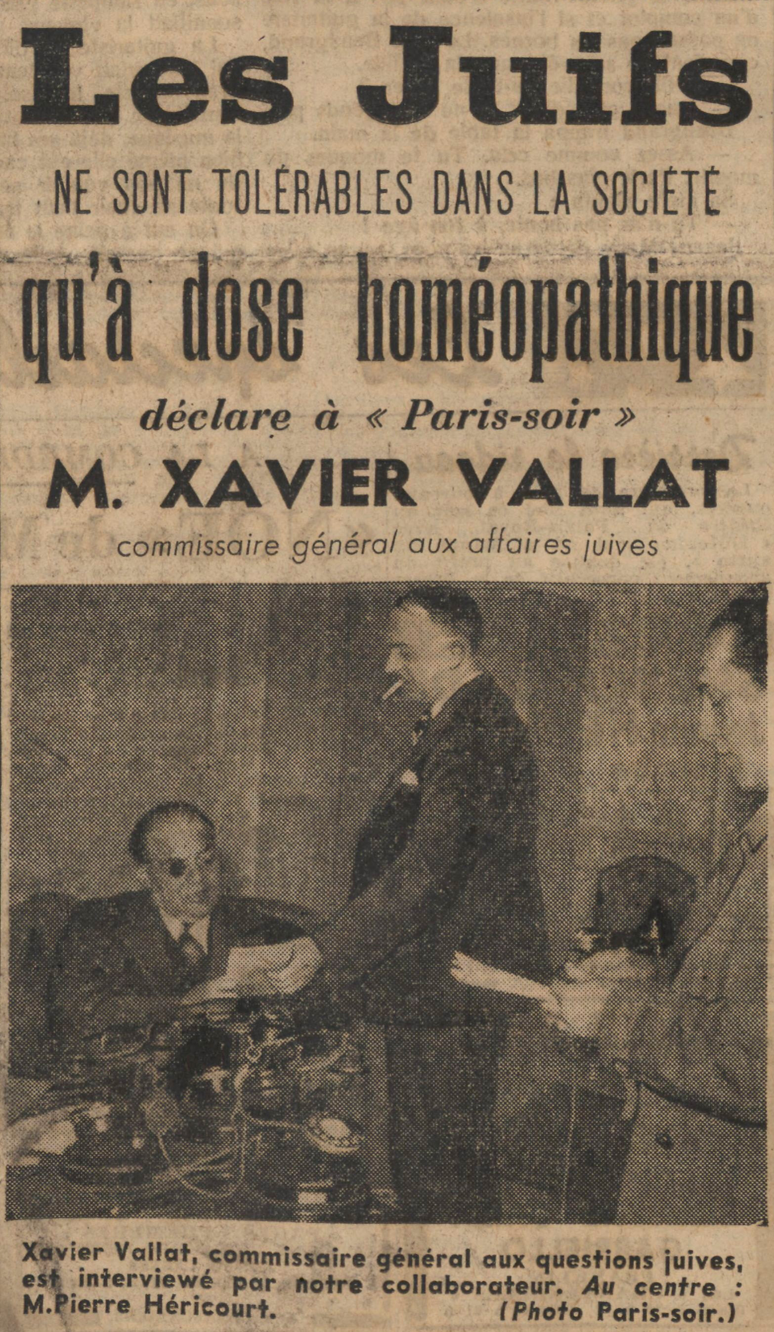 Article antisémite présentant une interview de Xavier Vallat du Commissariat général aux questions juives. Une du journal collaborationniste Paris-Soir du 5 avril 1941.